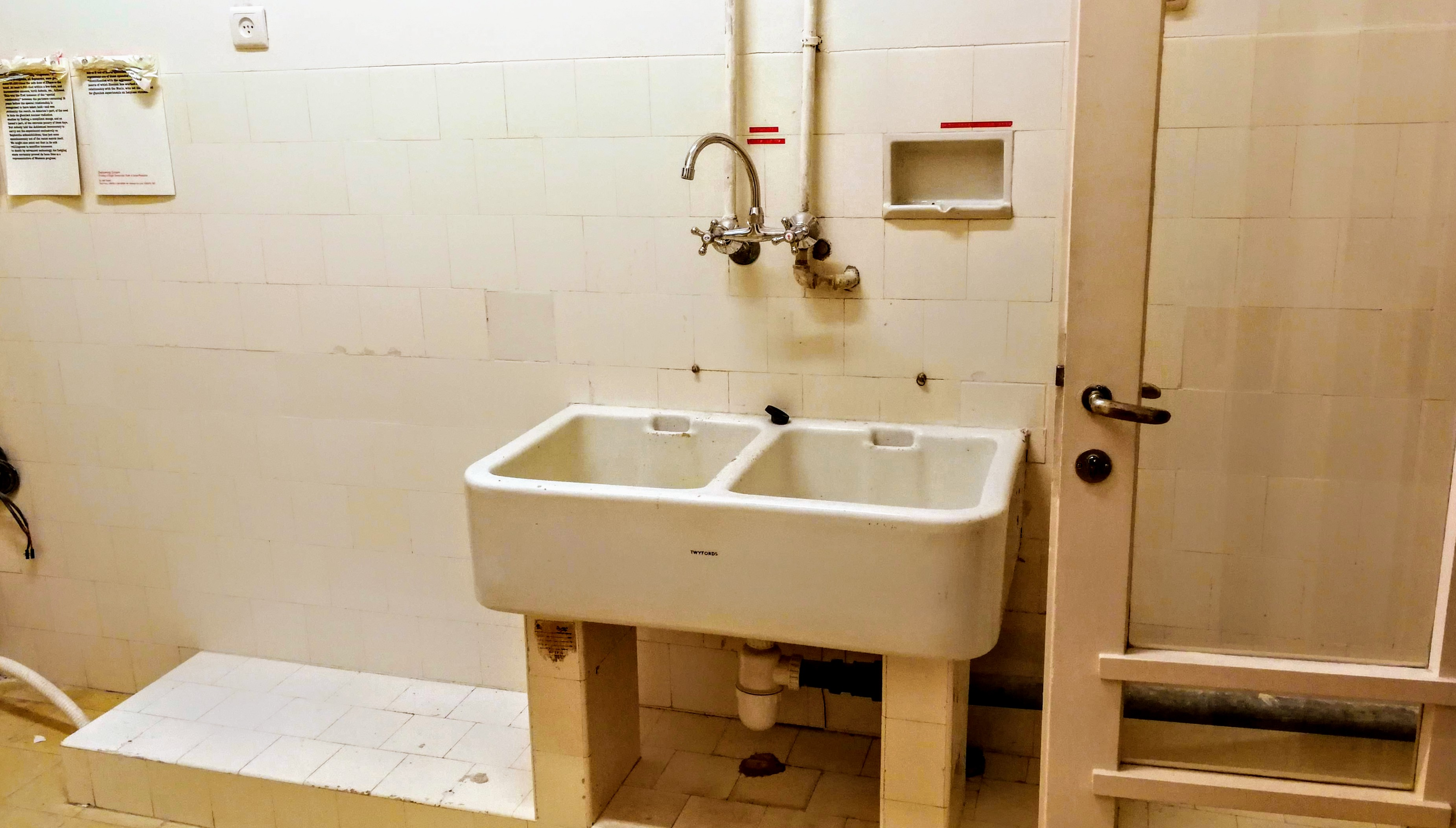 כיורים בבית מקס ליבלינג, מרכז העיר הלבנה, בניין מודרניסטי בסגנון באוהאוס בעל משמעות אדריכלית. הבית ממוקם ברחוב אידלסון 29, תל אביב. תוכנן על ידי האדריכל דב כרמי ונבנה בשנת 1936.